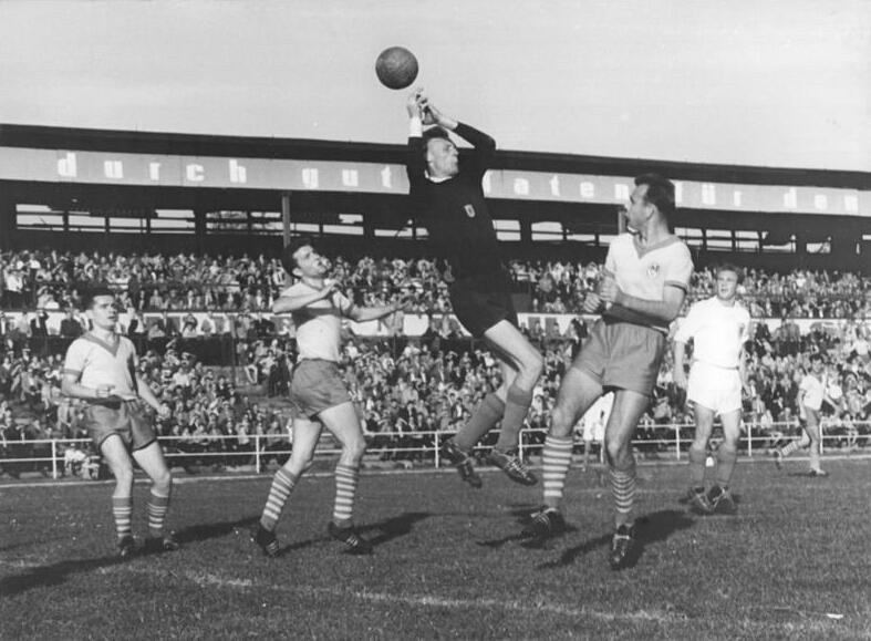 Zentralbild-Wendorf Za-Ku. 27.9.1959 Fußballspiel ASK-Vorwärts gegen SC-Einheit Dresden - Am 26.9.1959 fand in Dresden das Fußballspiel ASK-Vorwärts gegen SC-Einheit Dresden statt. UBz.: Dresdens Torsteher Großstück hatte hier im Kampf mit Meyer und Reichelt alle Hände voll zu tun.